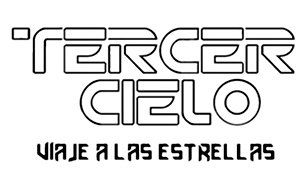 Logotipo del Álbum